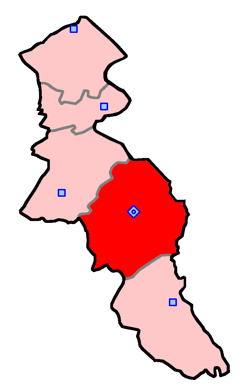 حوزهٔ انتخاباتی اردبیل برای انتخابات مجلس شورای اسلامی